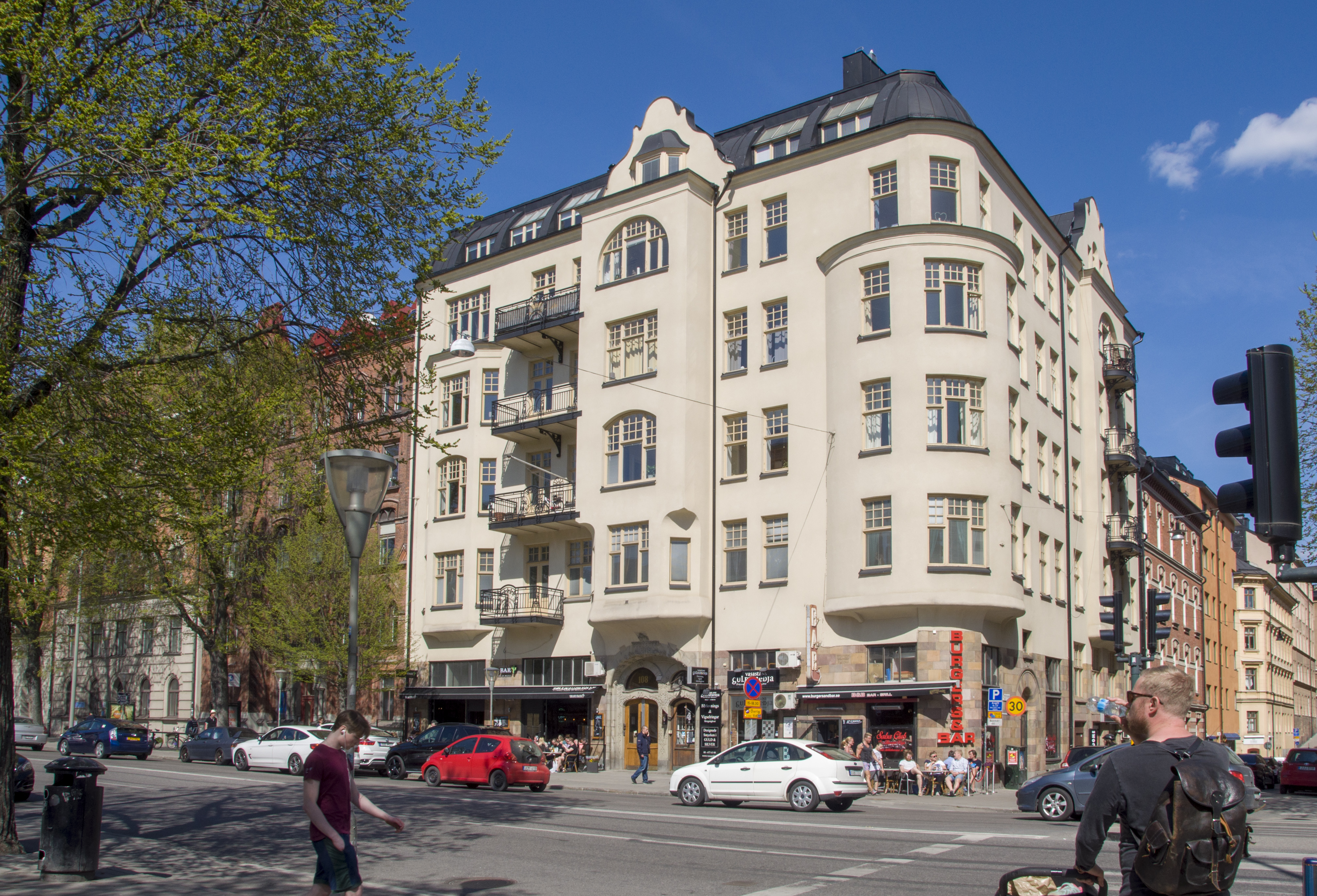 Apelträdet 4, Stockholm, Sveavägen 108. Ursprungligen Sveabadet. Nybyggnadsår 1904 - 1907 Andreas Gustaf Sällström (Arkitekt och byggmästare)